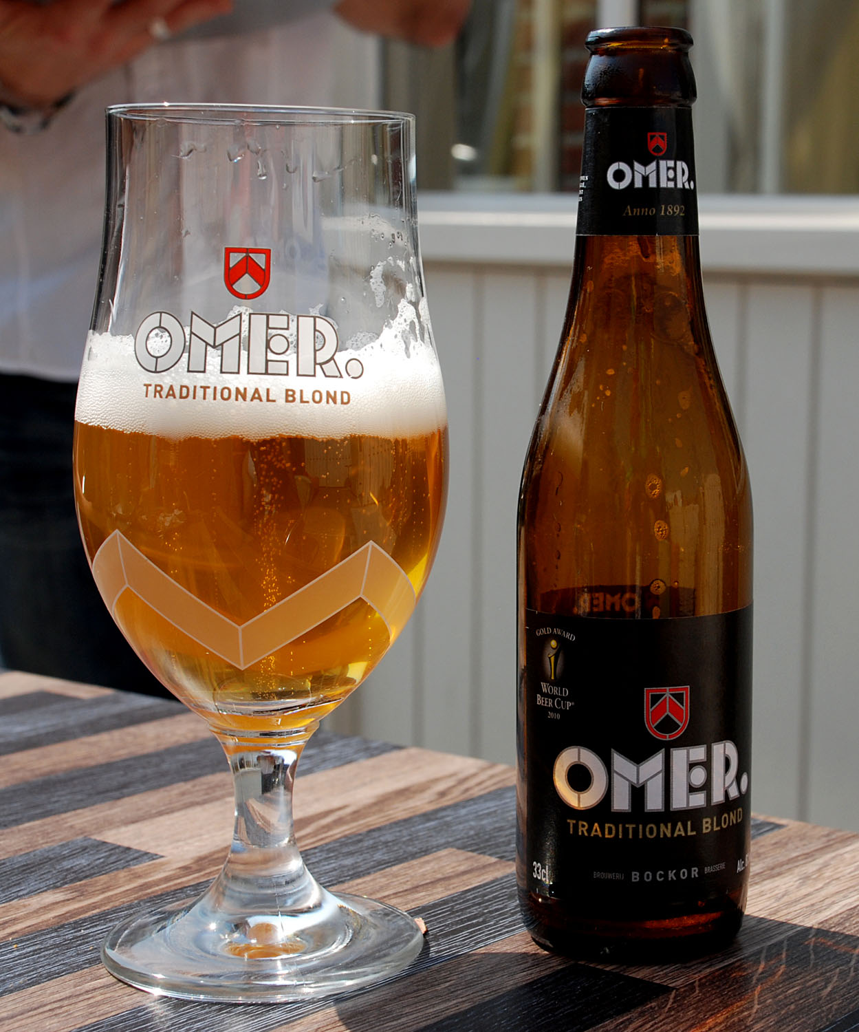 Belgisch bier